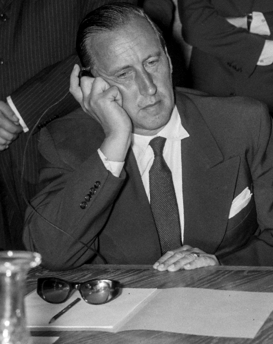 Den Dirk Spierenburg, 1959.